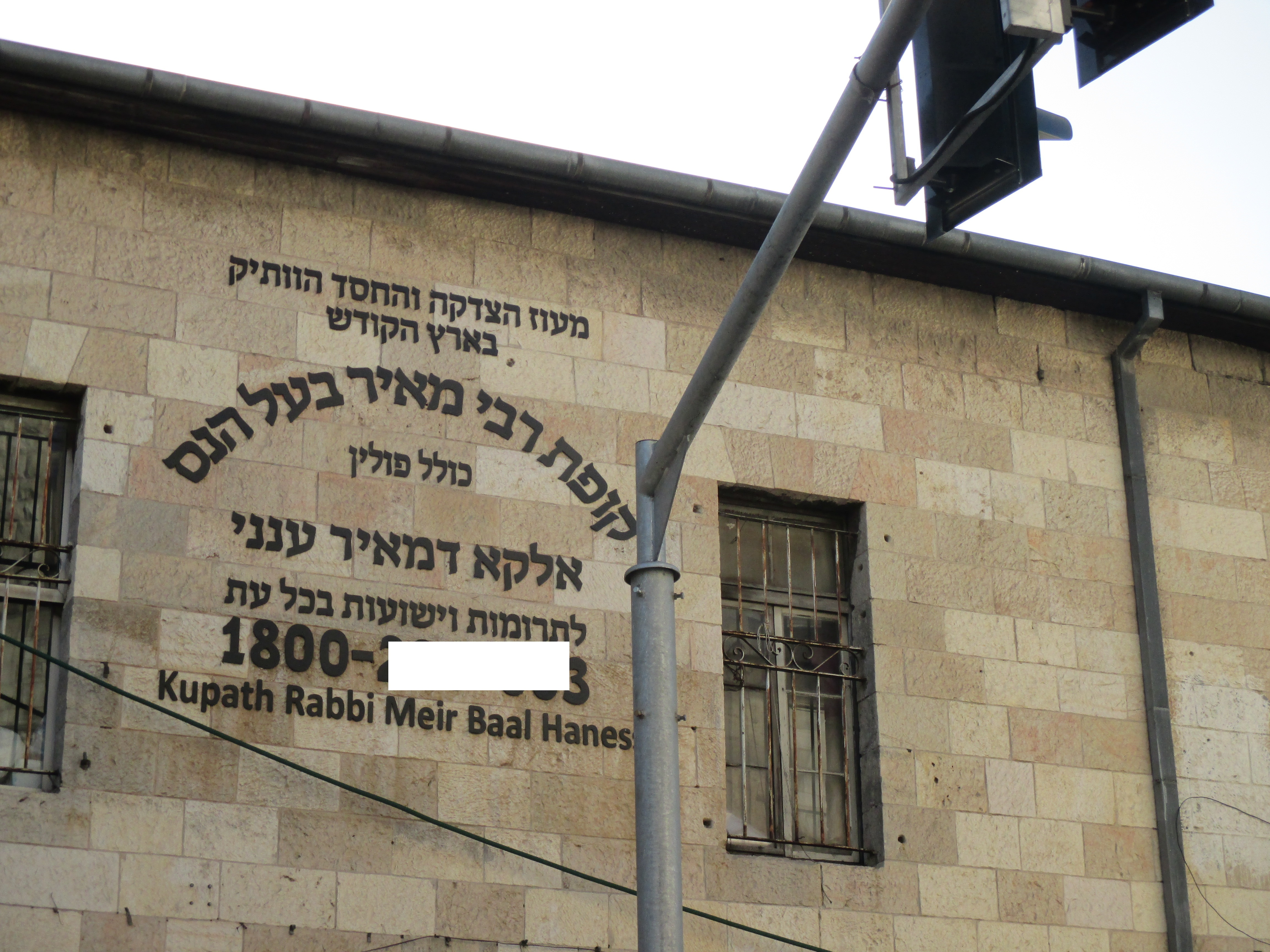 מבנה כולל פולין בכיכר השבת בירושלים.